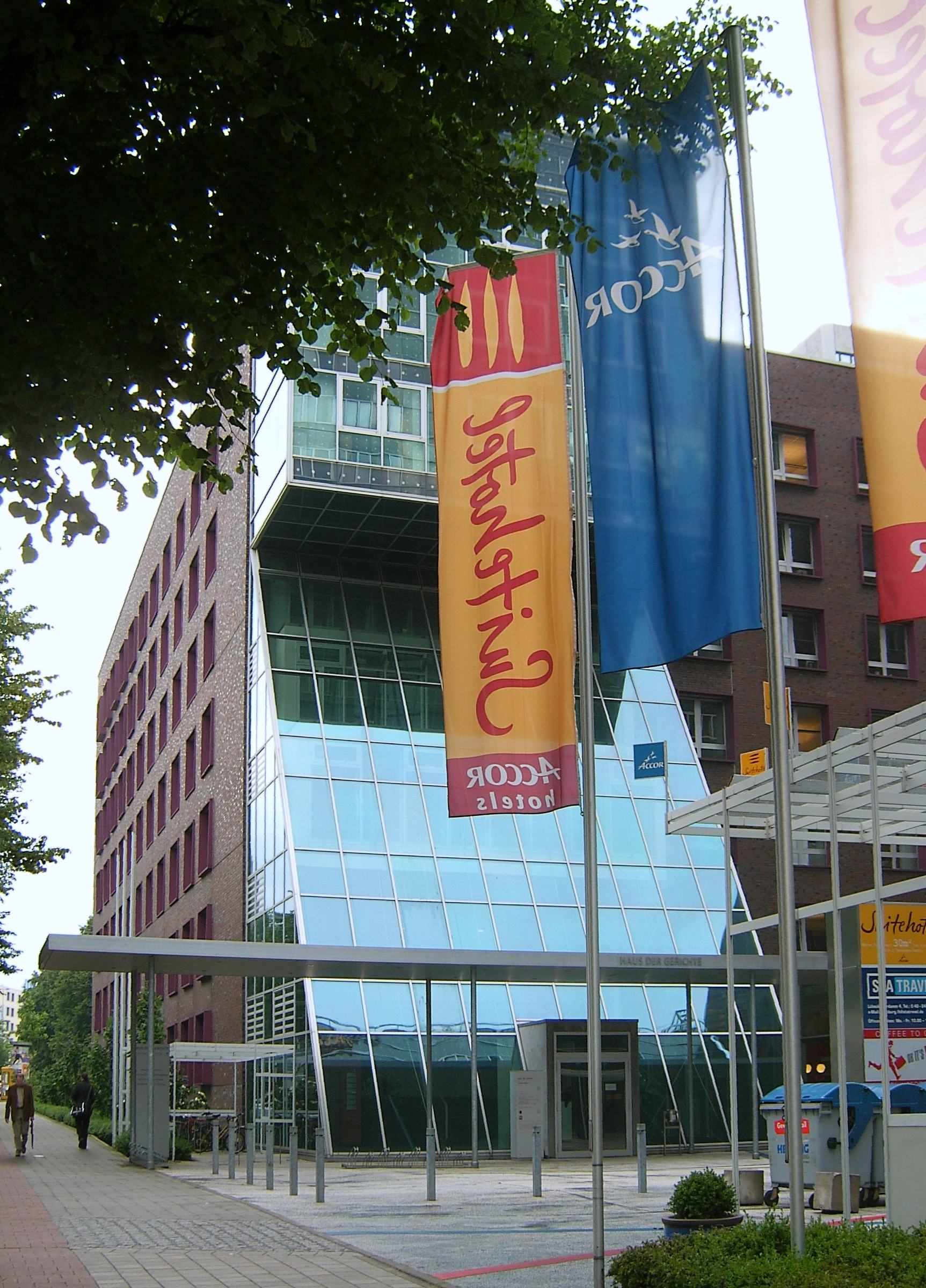 Das Hamburger Haus der Gerichte am Lübeckertordamm 2004 in St. Georg wurde Anfang des 21. Jahrhunderts errichtet und beherbergt neben dem Finanzgericht und den Verwaltungsgerichten auch das Amtsgericht Hamburg-St. Georg und die Heilberufsgerichte der Hansestadt.